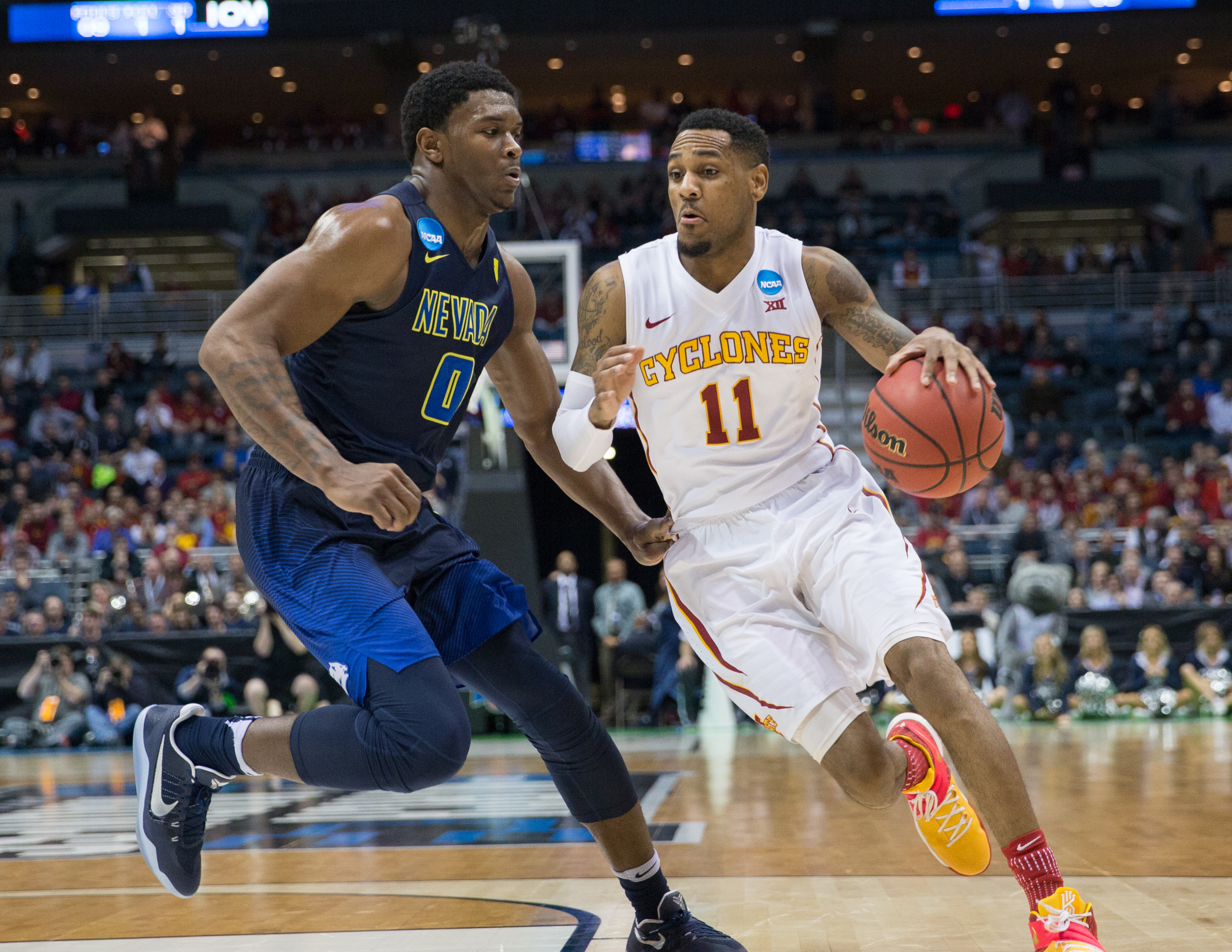 ISU vs Nevada